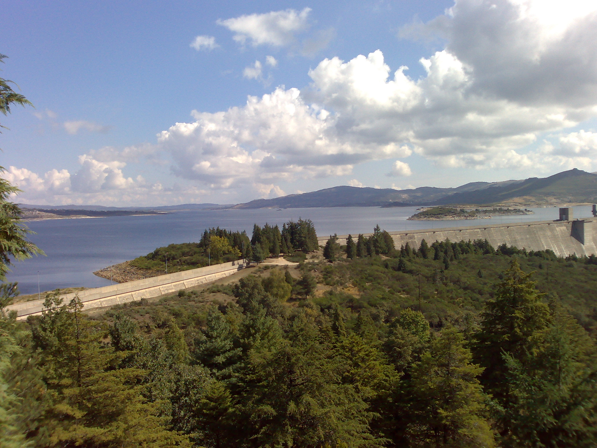 Barragem Alto Rabagao